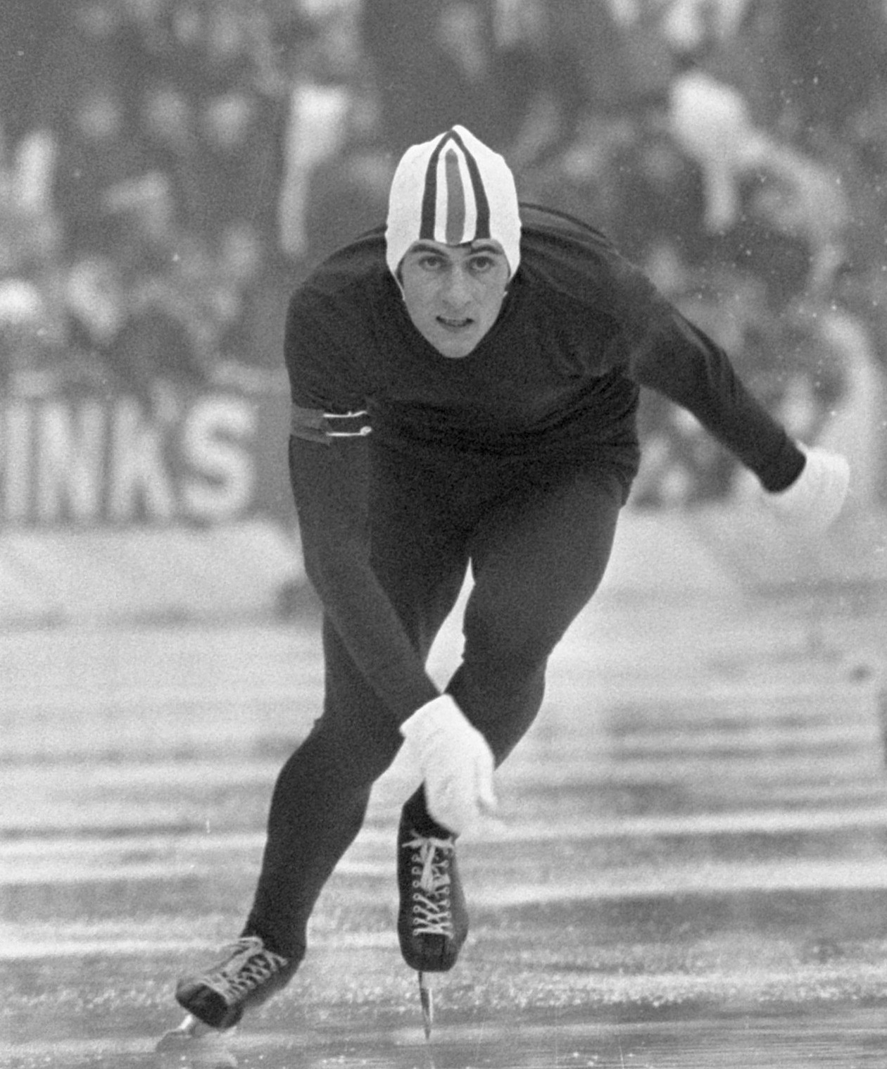 Nederlandse kampioenschappen schaatsen dames en heren te Deventer. Jan Bazen in aktie